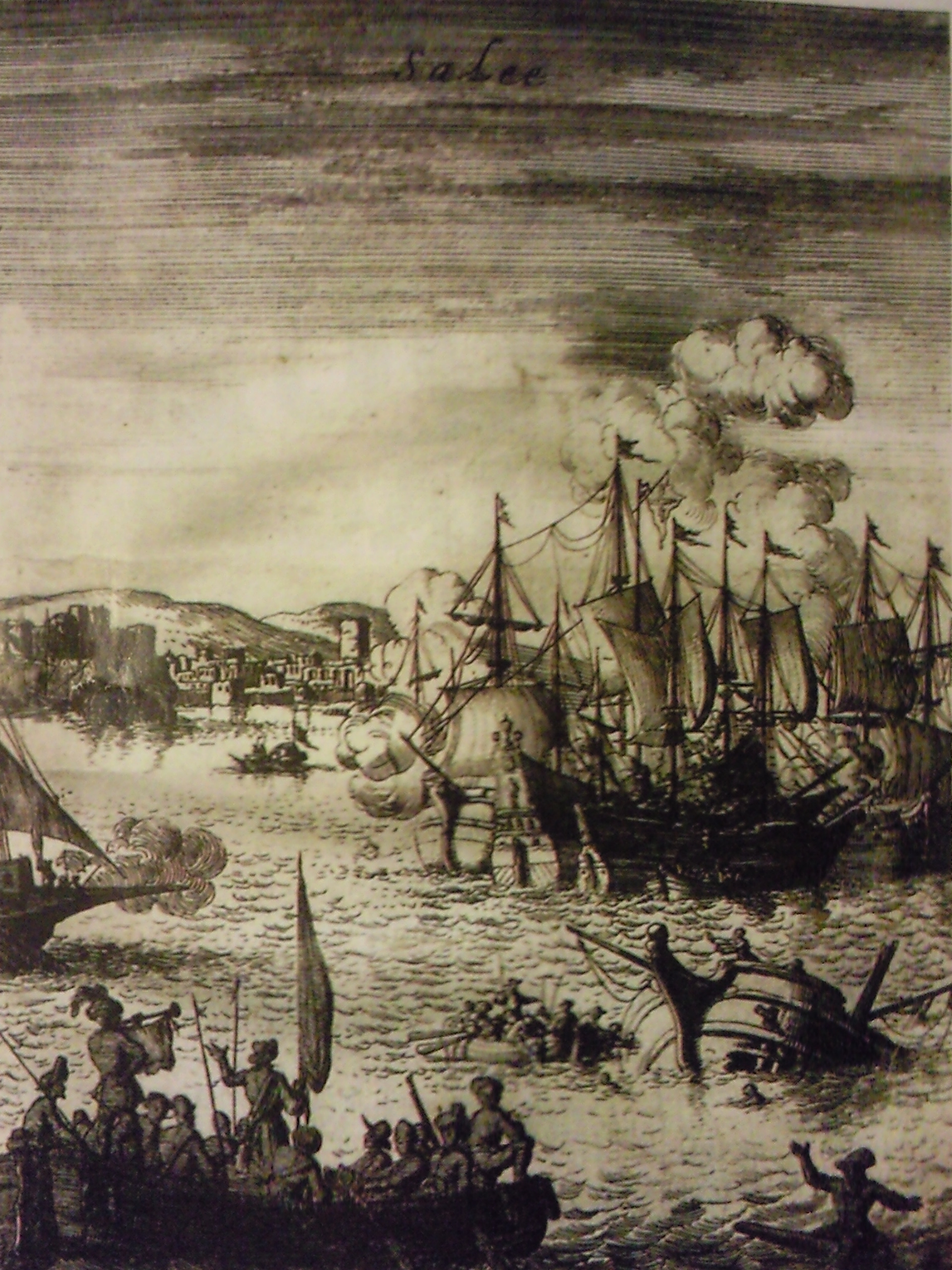 Salé cité corsaire